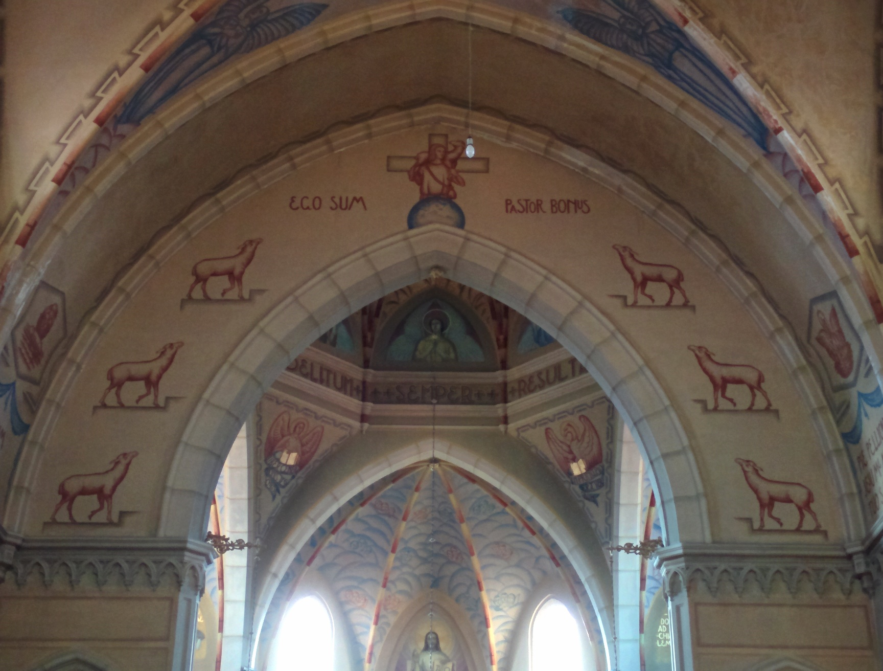 Sei pecorelle si dirigono verso il padrone che ha ritrovato la loro compagna smarrita. Dettaglio delle decorazioni nella chiesa parrocchiale di San Vitale a Castelnovo di Isola Vicentina in provincia di Vicenza.